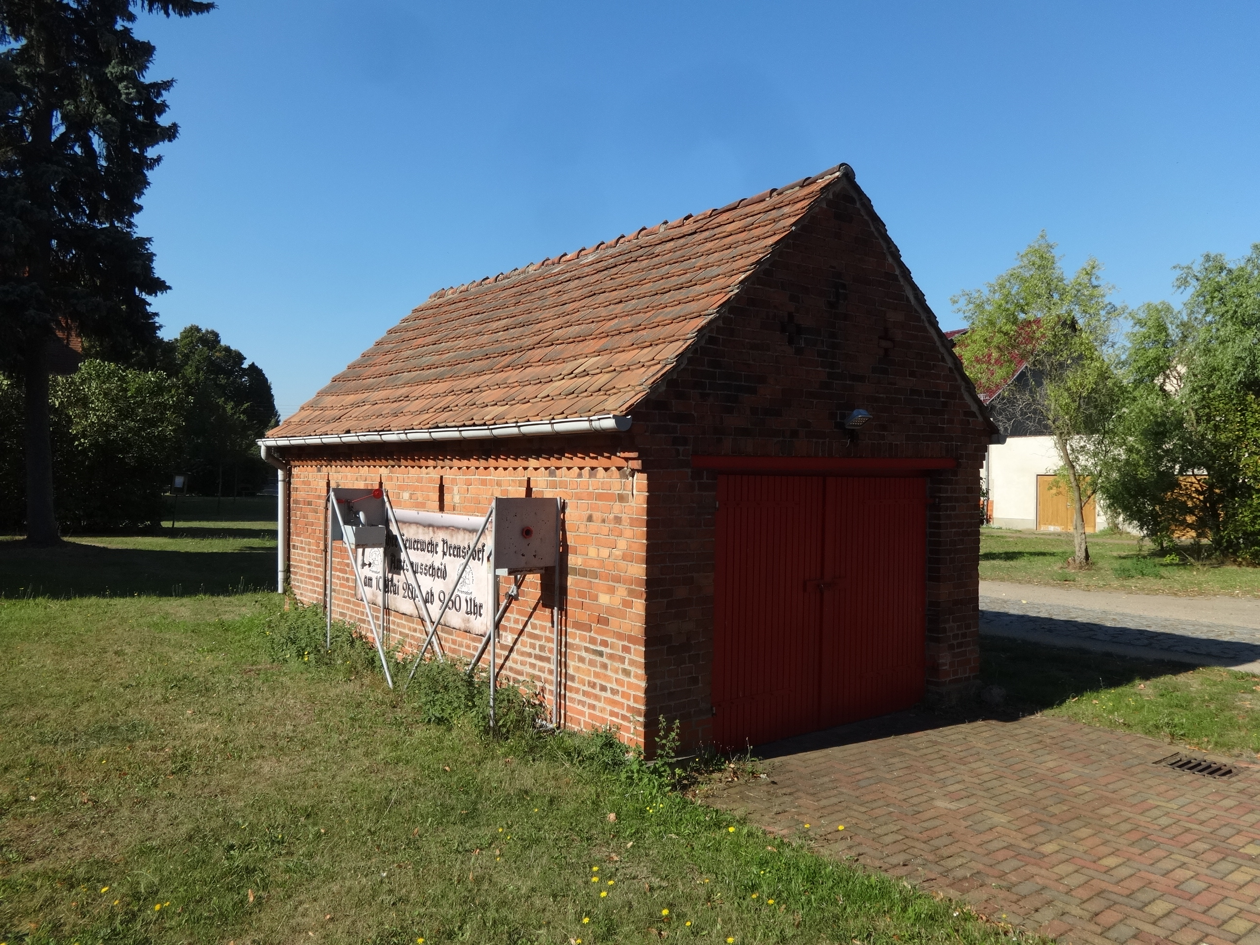 Prensdorf, ein Ortsteil der Gemeinde Dahmetal in Brandenburg